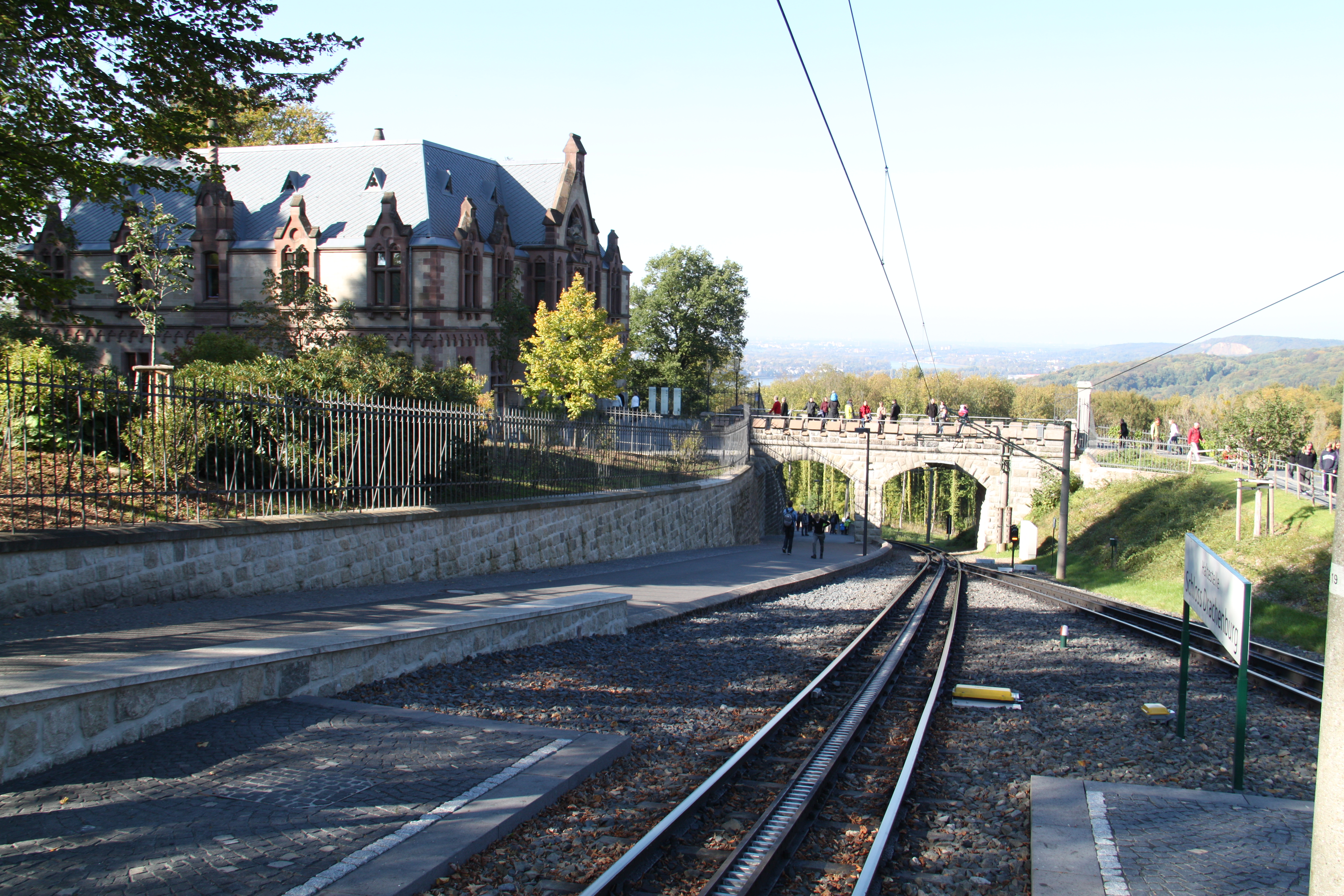 Drachenfelsbahn, Gleisanlage; links: Schloss Drachenburg